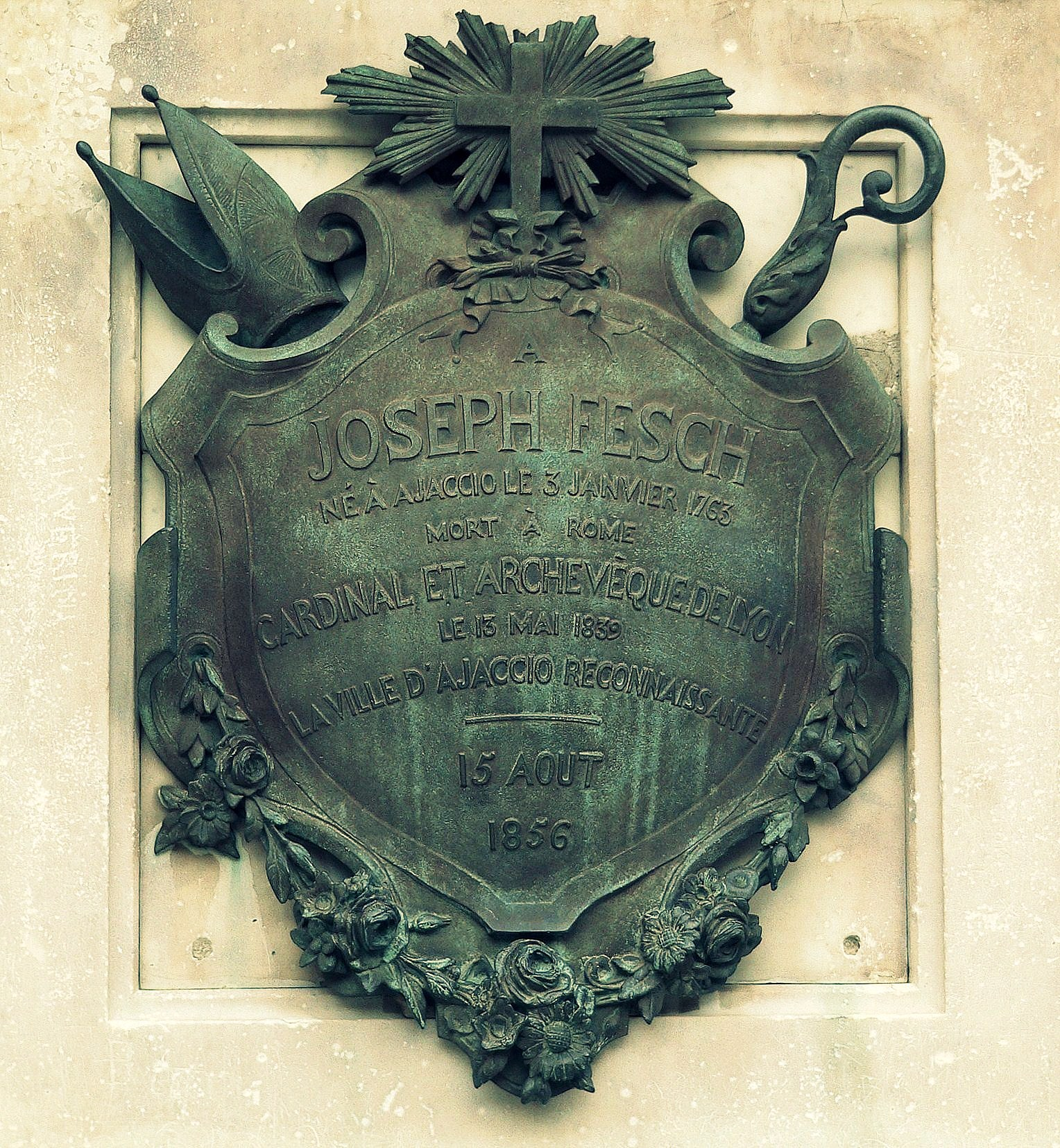 Cardinal Joseph Fesch Sculpteur : Gabriel-Vital Dubray Cour du Palais Fesch Ajaccio, Corse-du-Sud